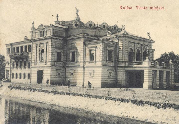 Kalisz, budynek Teatru Miejskiego, 1900, zniszczony w 1914